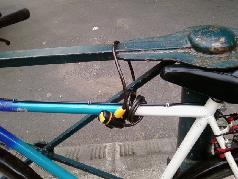 Antivol de vélo type "câble"